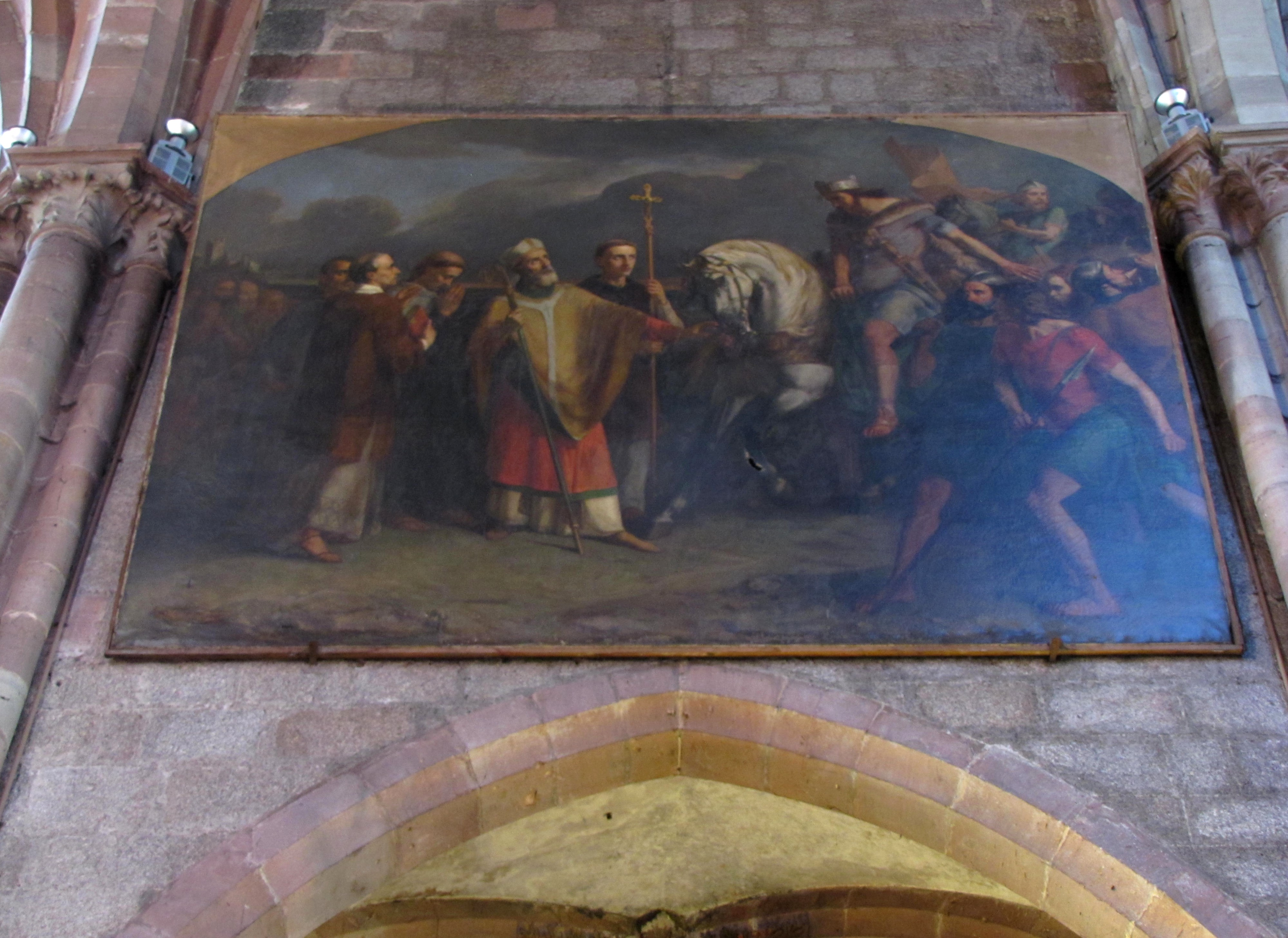 Alsace, Bas-Rhin, Sélestat, Église Saint-Georges (PA00084978, IA00124588). Tableau "St-Germain barrant la route à Eocharich" (Pierre Adolphe BAUDIN, huile sur toile, 380cm de large, 1836)